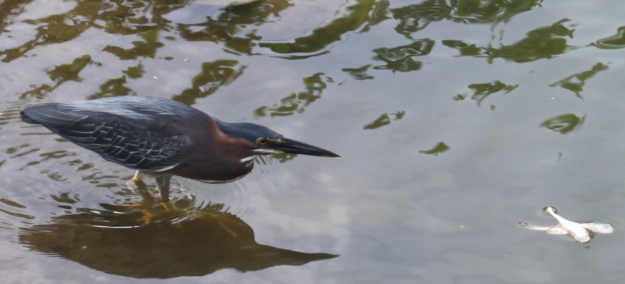 Les poissons sont attirés par la couleur de la fleur. D'après les locaux le blanc rappelle la couleur du pain que les touristes jettent aux poissons